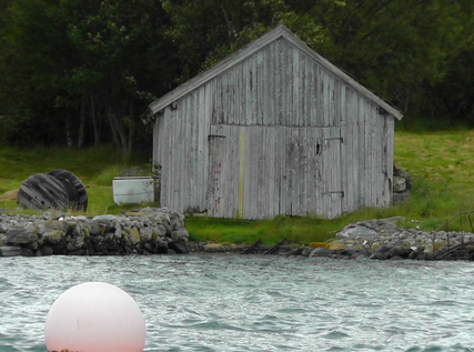 Torholmen